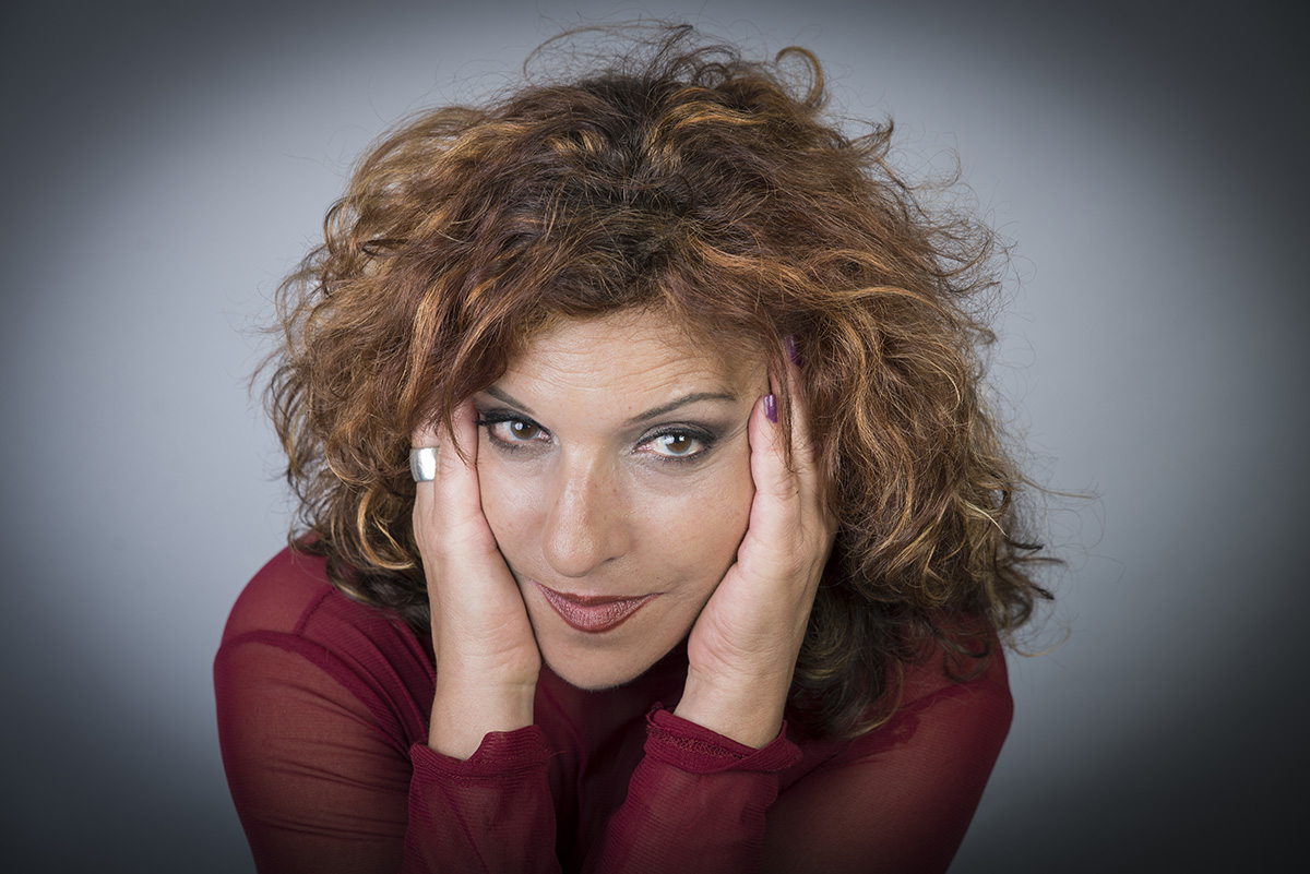 Montse Torrent